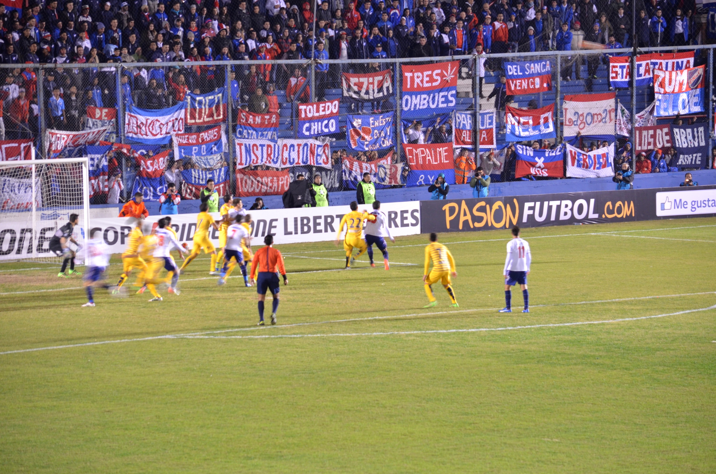 Imagen del partido disputado entre Nacional y Boca Juniors, en el estadio Gran Parque Central, por los cuartos de final de la Copa Libertadores 2016